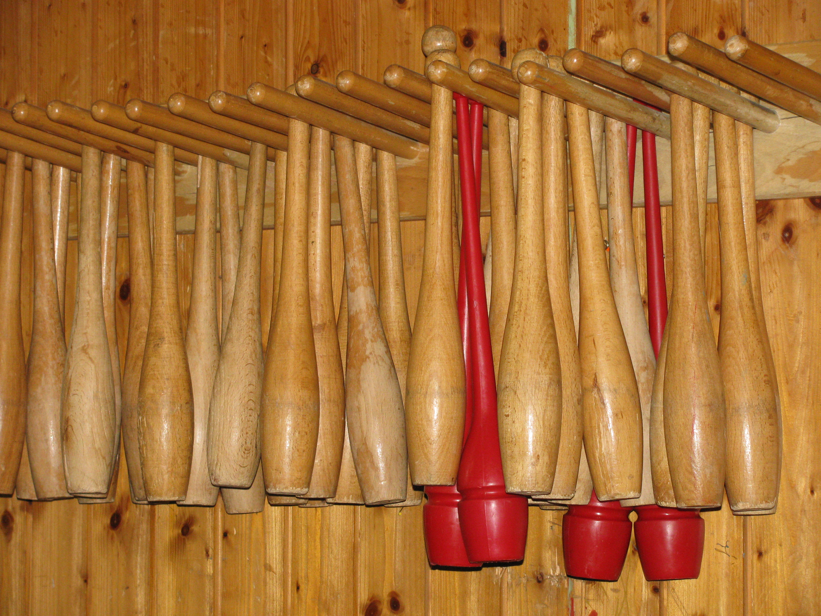 Deutschland - Baden-Württemberg - Bodenseekreis - Kressbronn am Bodensee: Alte Festhalle, Keulen